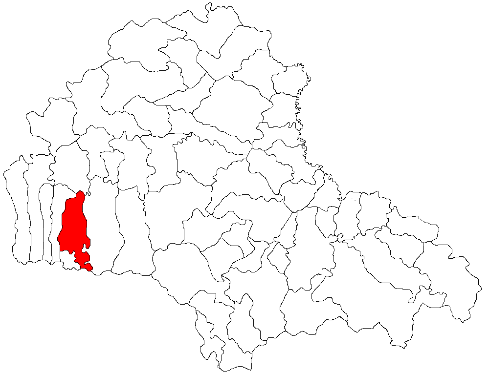 Categorie:Hărţi ale judeţului Braşov